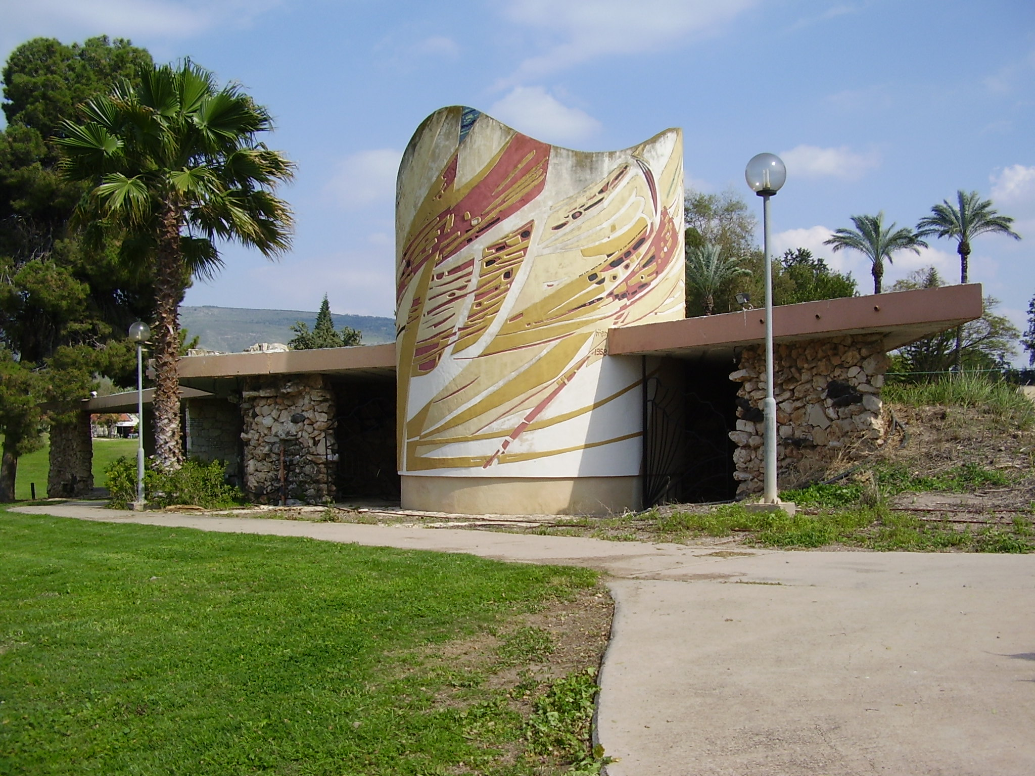 בית הצנחן בקיבוץ מעגן